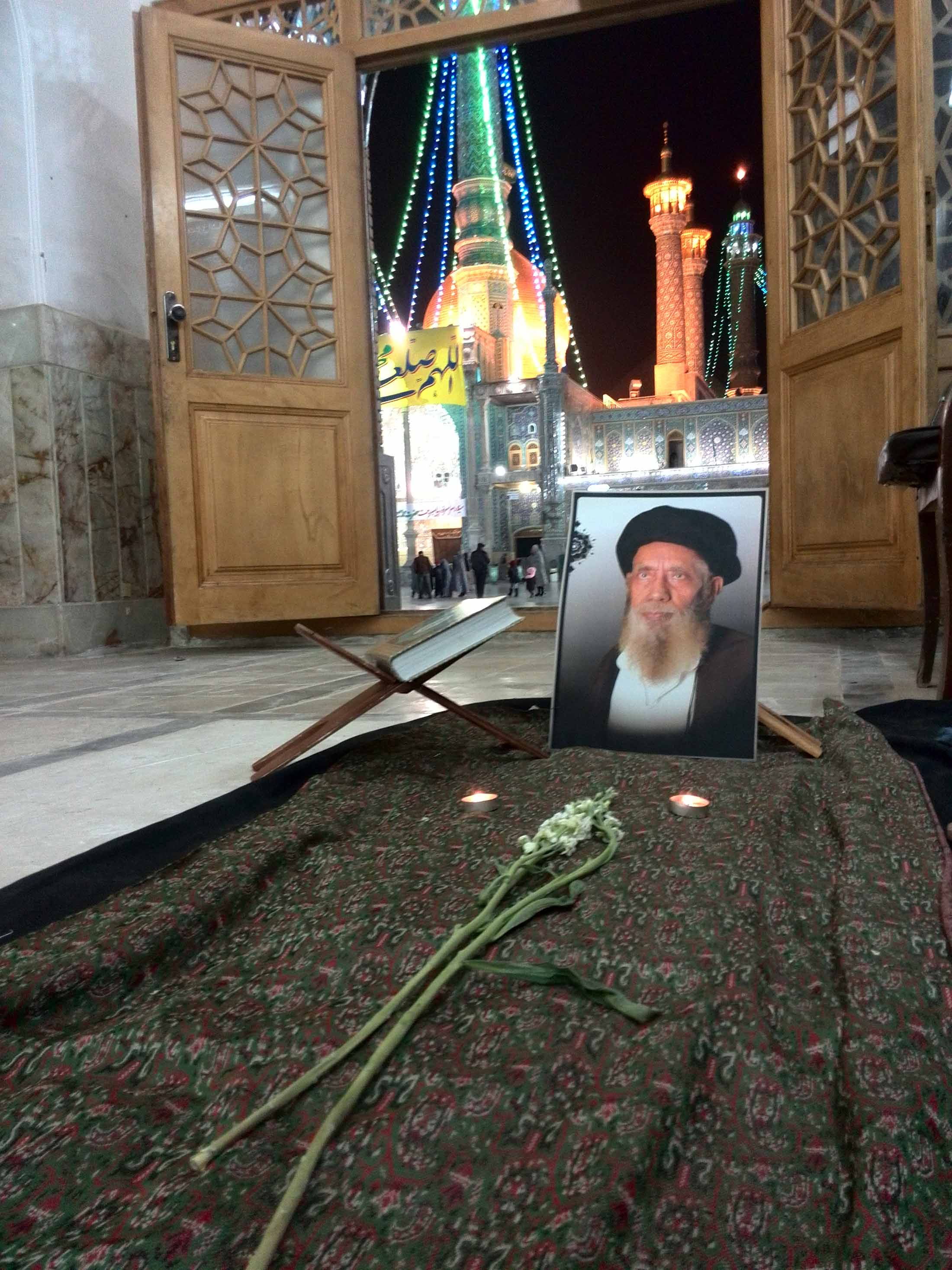 حرم حضرت معصومه سلام الله علیها، مقبره آیت الله جزایری ره، حجره 35